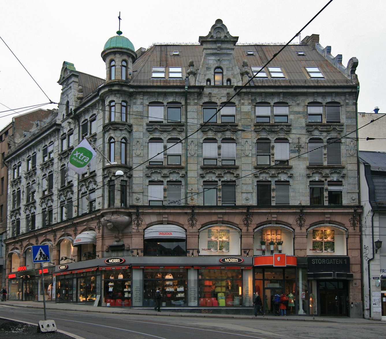 Doblouggården, Storgata 1, Oslo. Oppført 1899; arkitekt Julius Foseid.